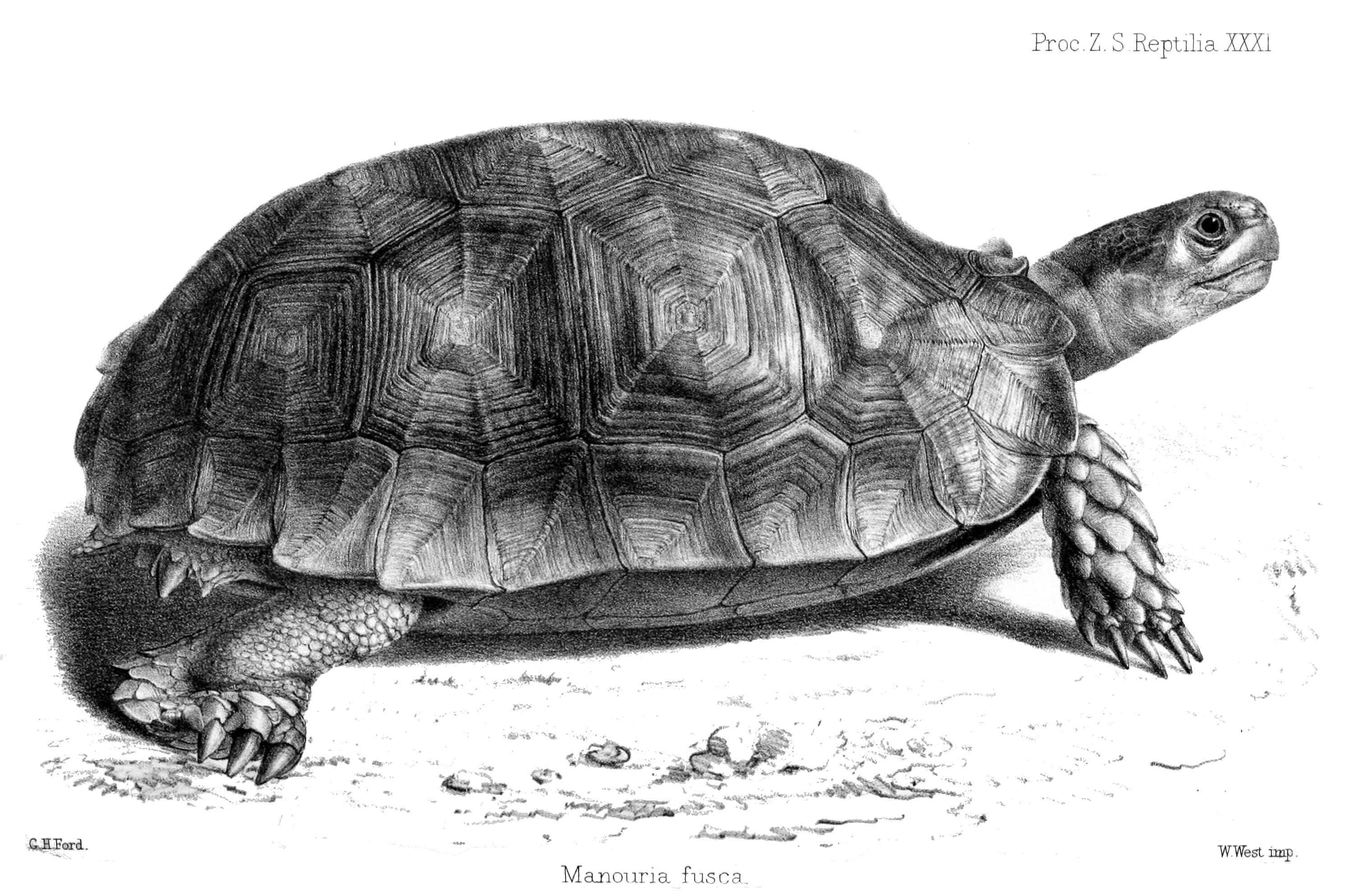 Manouria fusca = M. emys